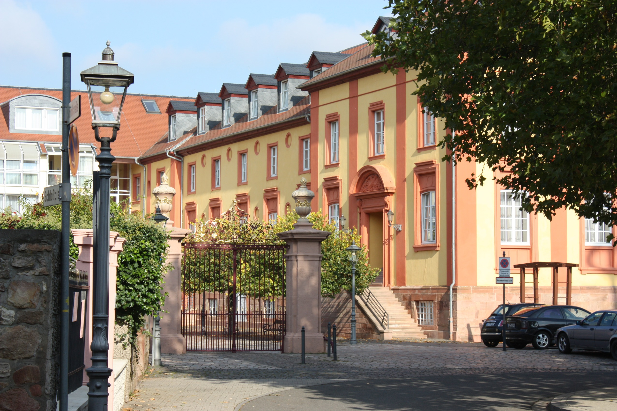 Schloss Kirchheimbolanden, heute Alten- und Pflegeheim (Denkmalzone Schloss) This is a photograph of an architectural monument.It is on the list of cultural monuments of Kirchheimbolanden